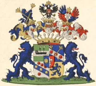 Sieversi suguvõsa krahvivapp (Venemaa)